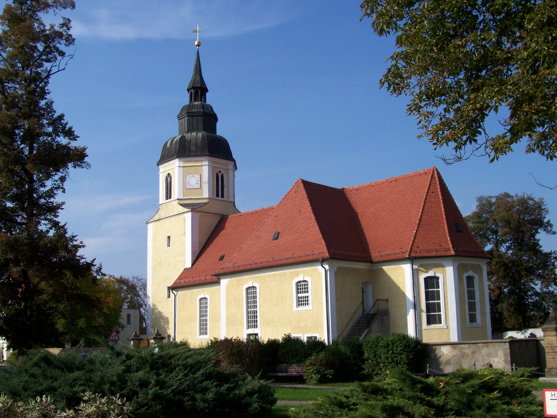 Pfarrkirche St. Georg Großkmehlen, Brandenburg, Germany, 1205